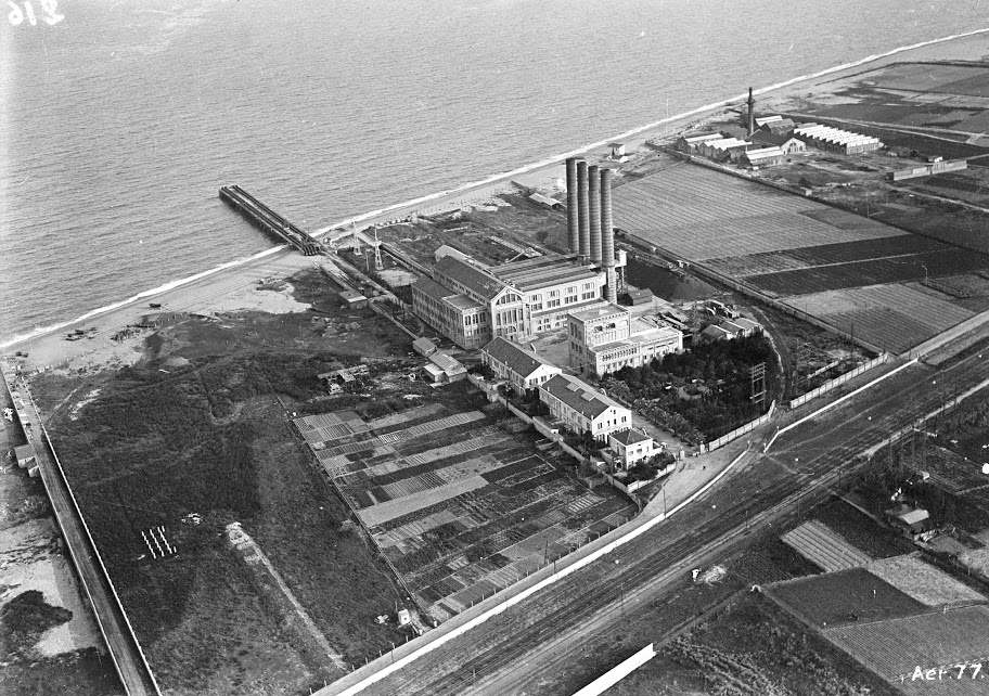 Vista aérea de la central térmica de Energía Eléctrica de Cataluña en San Adrián de Besós